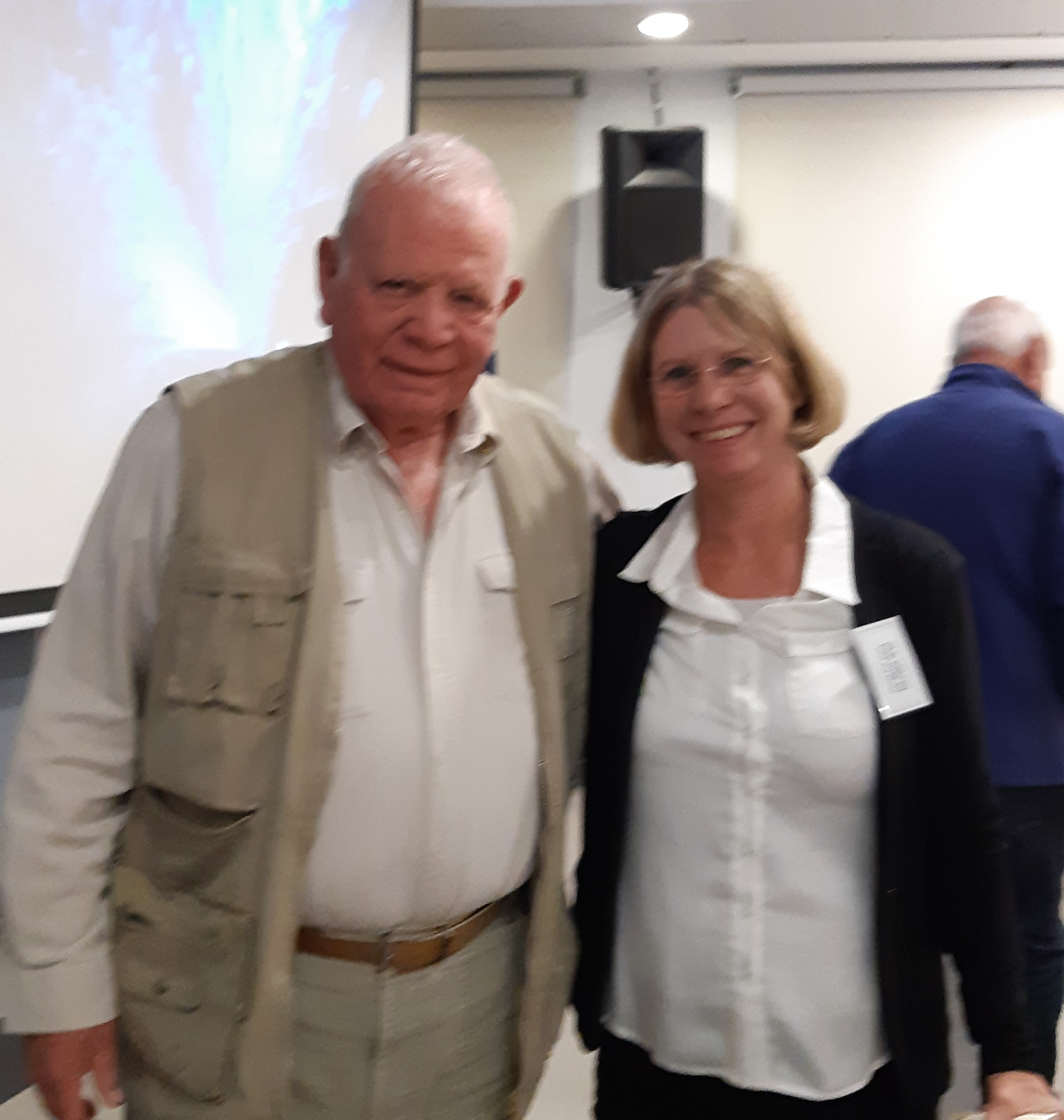 מנהלת בית הספר לקציני ים במפגש לזכר בוגרי בית הספר שהלכו לעולמם 15 בנובמבר 2018